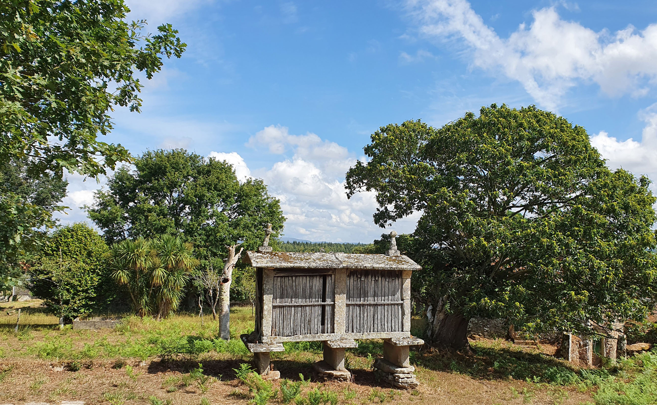 Lugar de Gradoi (Antas de Ulla), no que se ubica a igrexa parroquial de Reboredo. Nesta zona de Antas de Ulla son moi comúns os hórreos con cuberta de laxes de pedra. Este exemplar é un dos máis antigos da Comarca da Ulloa, de dous claros e -como é habitual nestes casos- con porta penal. Aséntase en tres cepas sobre as que se descansan tres ménsulas que constitúen o tornarratos.